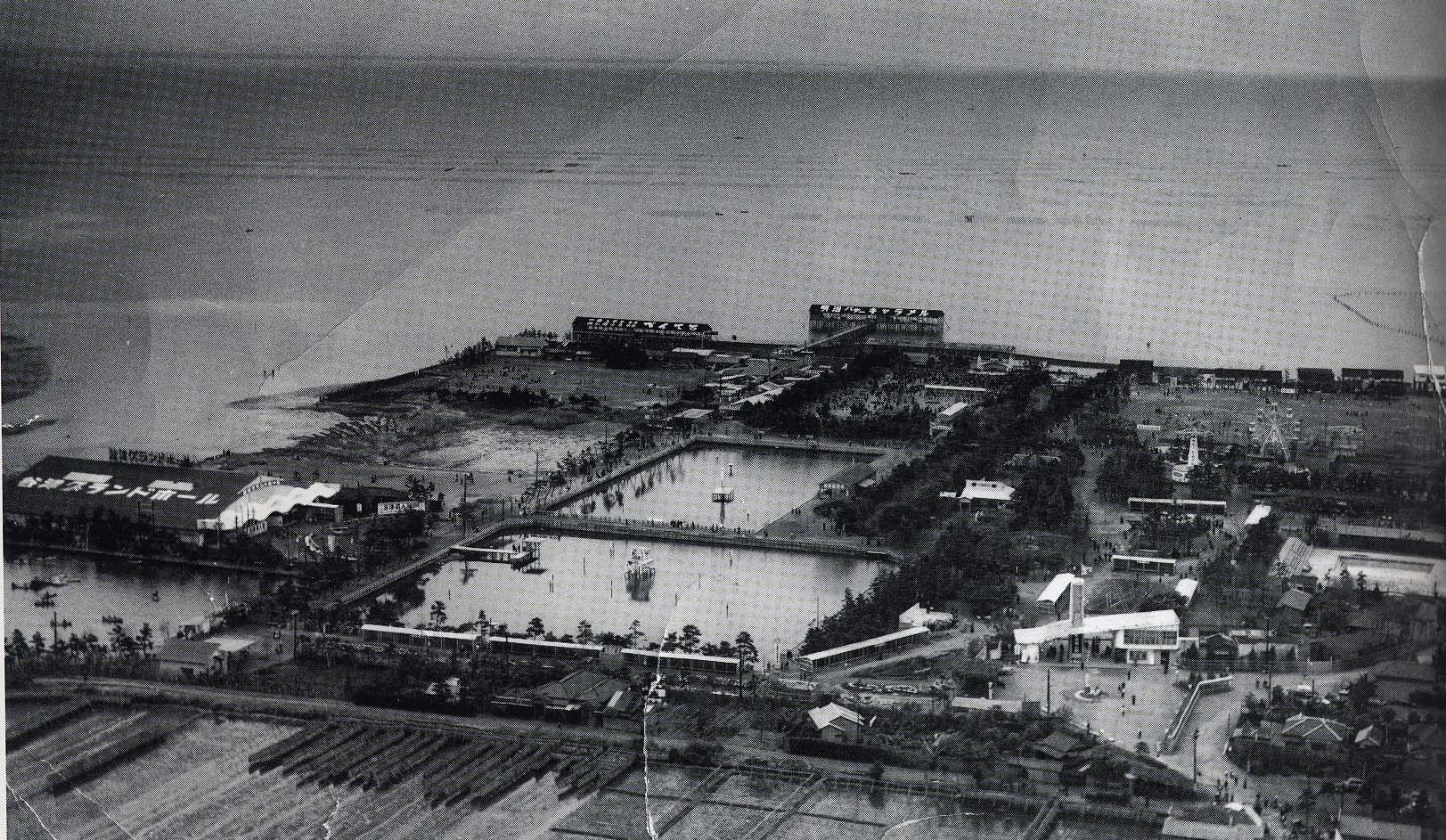 谷津遊園全景